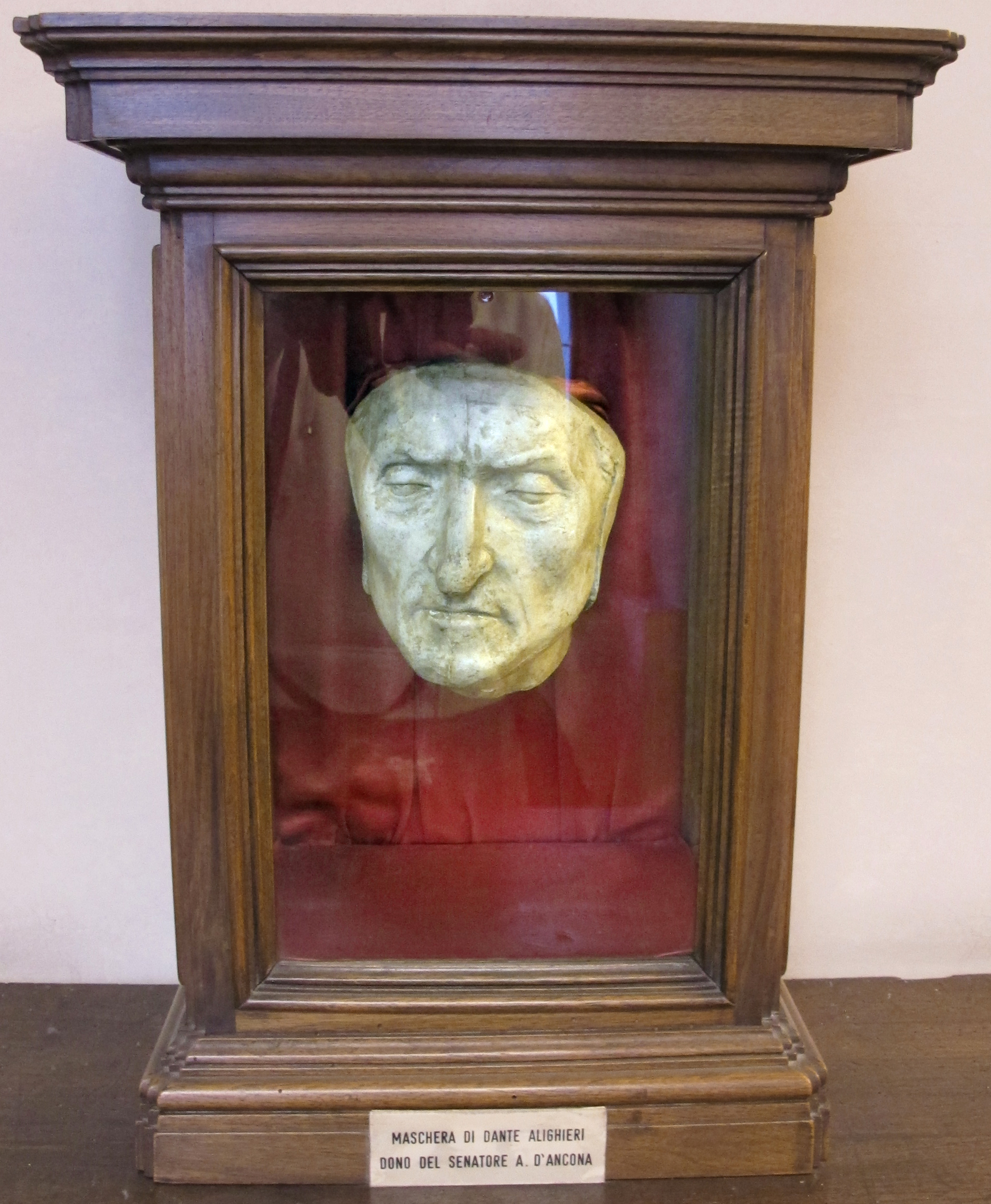 Palazzo Vecchio, Firenze